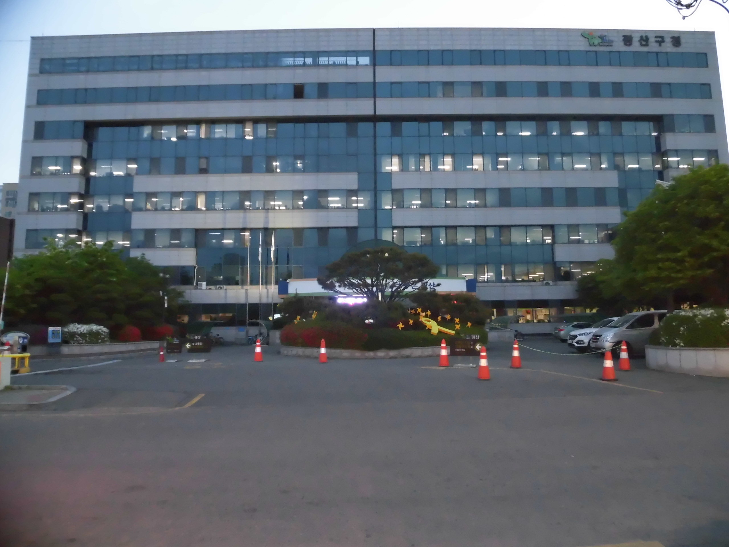 광주광역시 광산구에 있는 광산구청